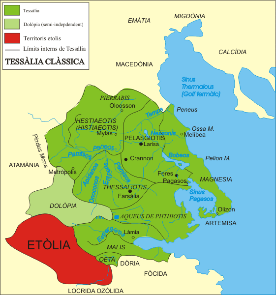 Mapa de Tessàlia, imatge propia